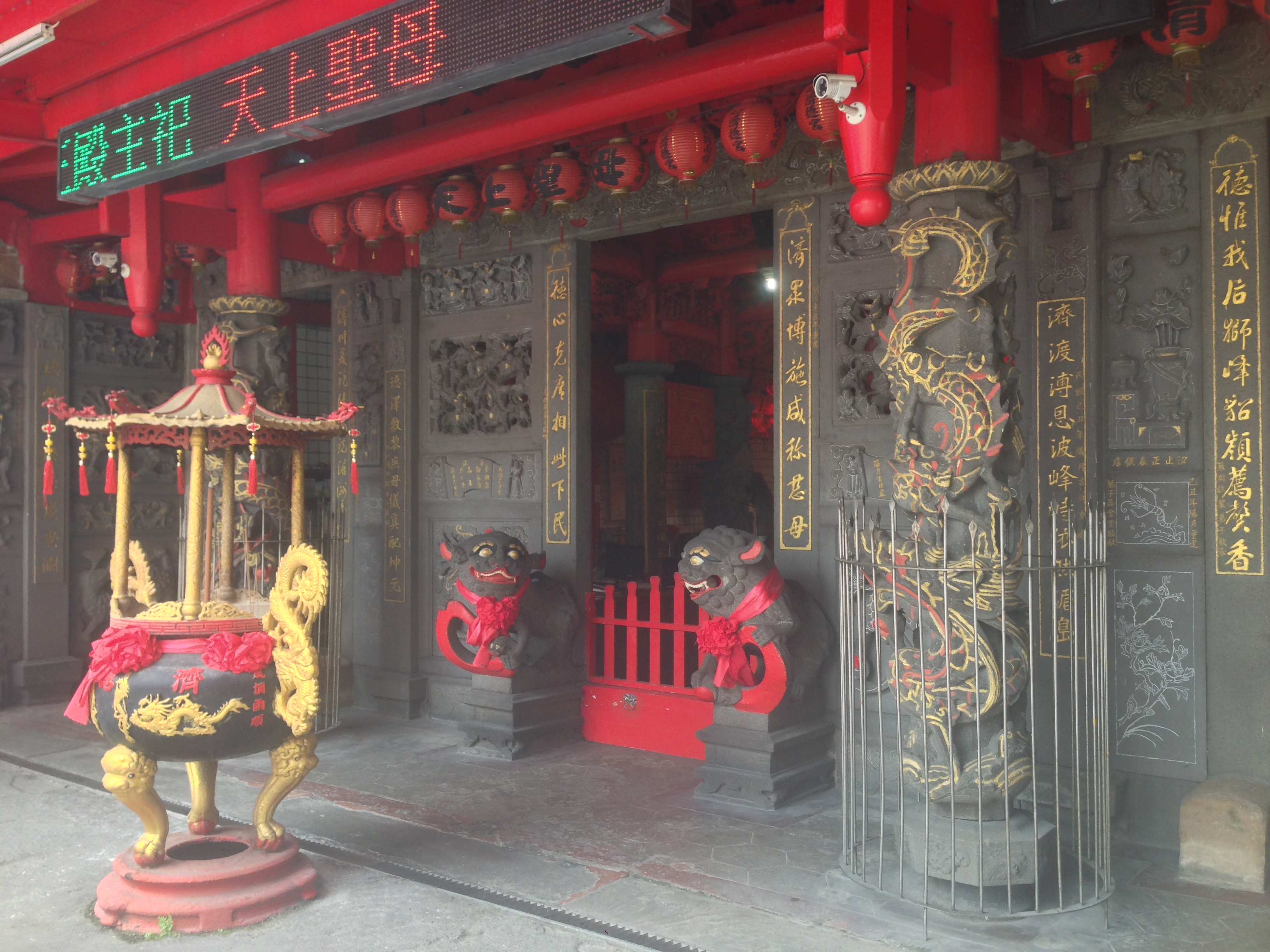 中文（台灣）: 汐止濟德宮門殿